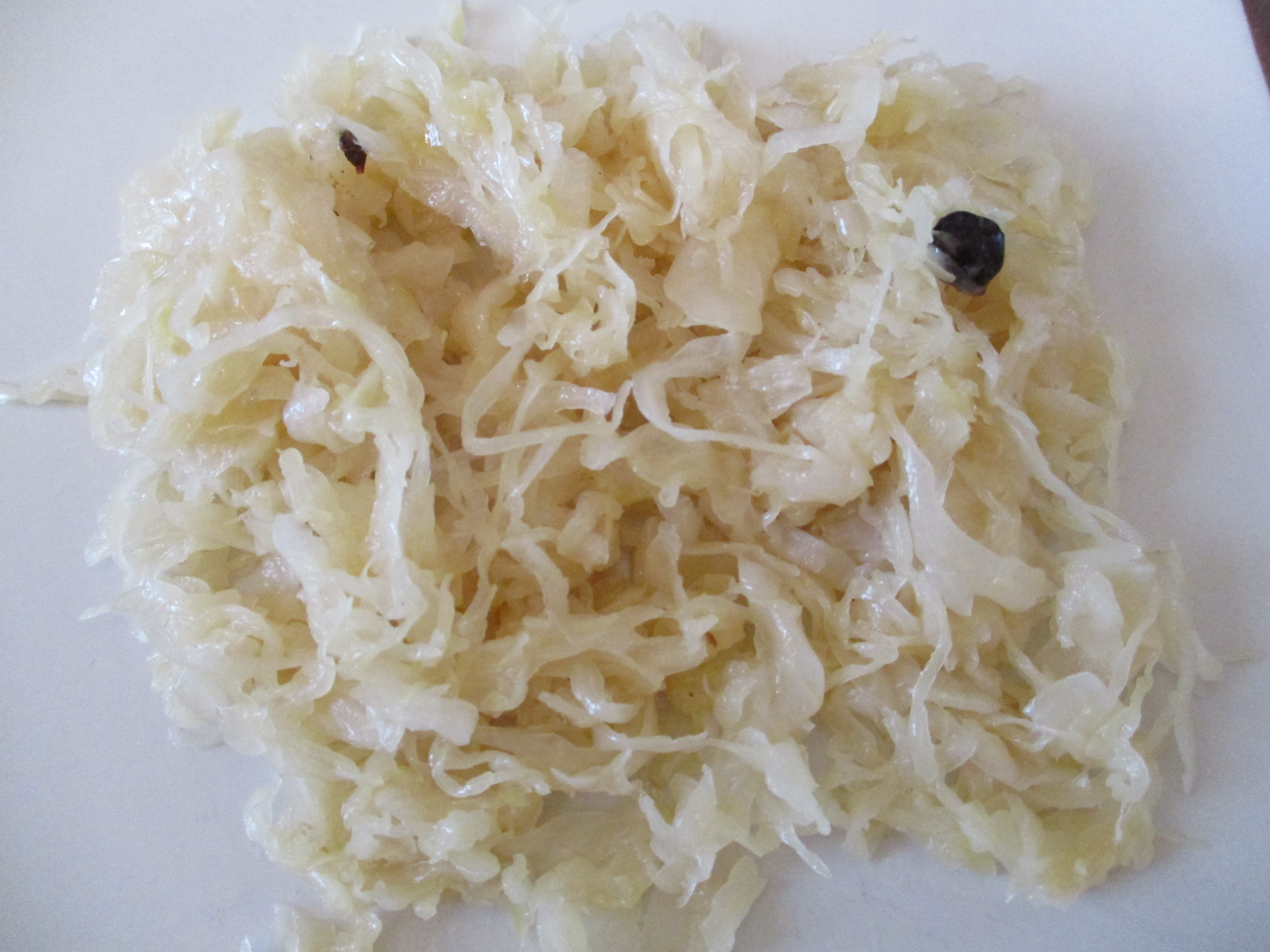 Choucroute alsacienne